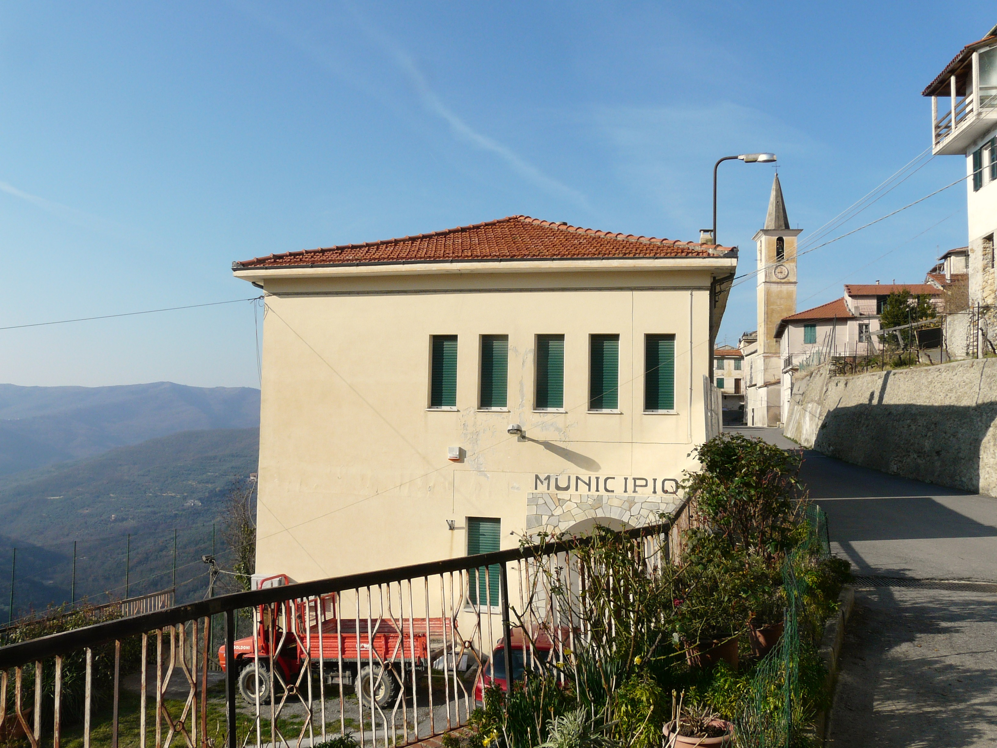 Municipio, Cesio, Liguria, Italia